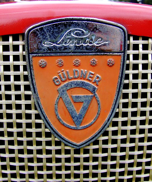 Quelle: selbst fotografiert, 08/2006 Fotograf: Späth Chr.